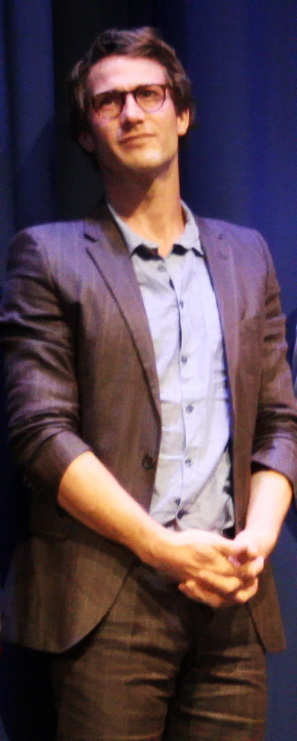 David Rott auf dem Münchner Filmfest 2010. Premiere des Films Kongo.